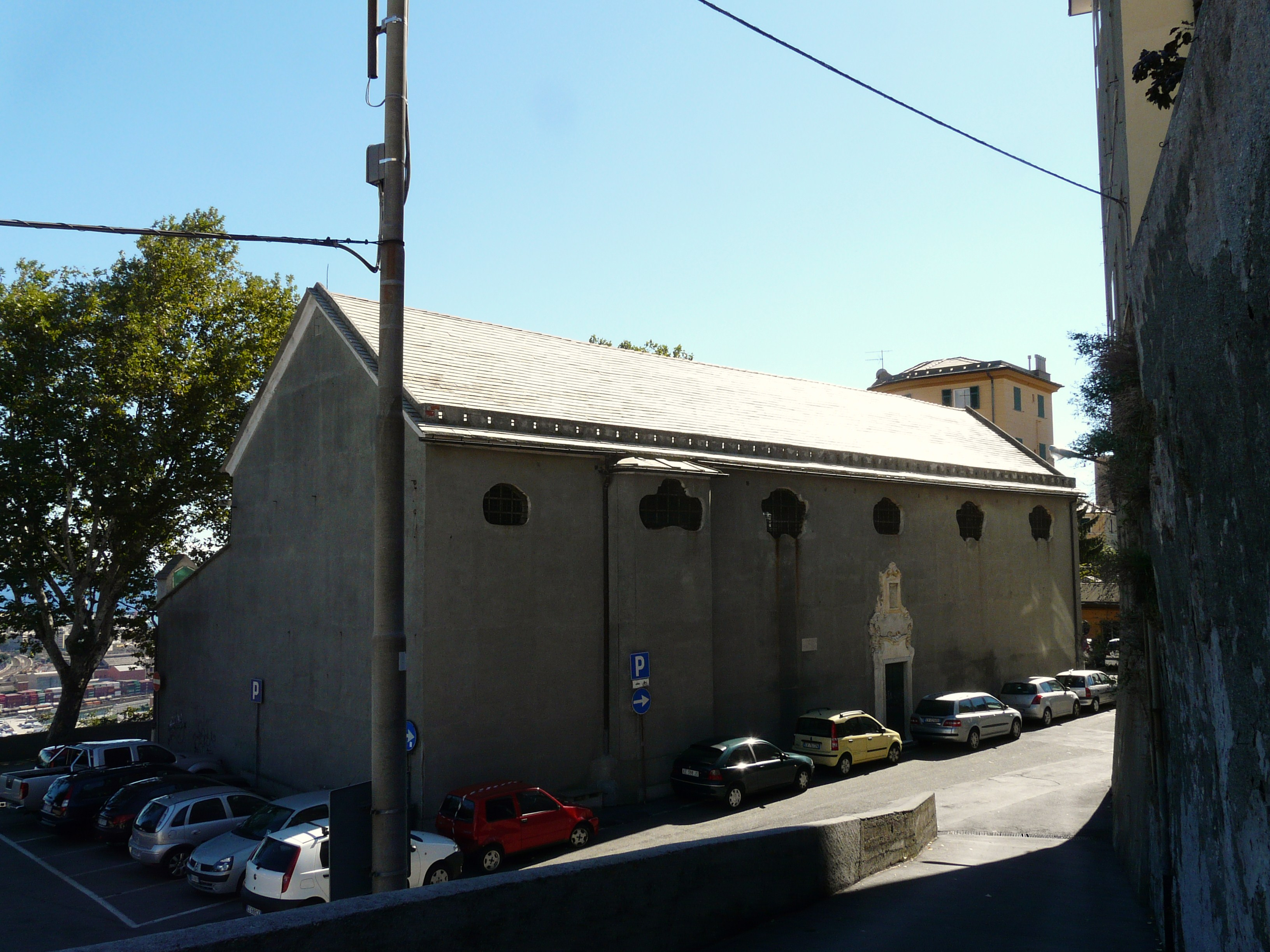 Complesso dell'oratorio di Nostra Signora Assunta presso il santuario di Nostra Signora Incoronata, Coronata, Genova, Liguria, Italia